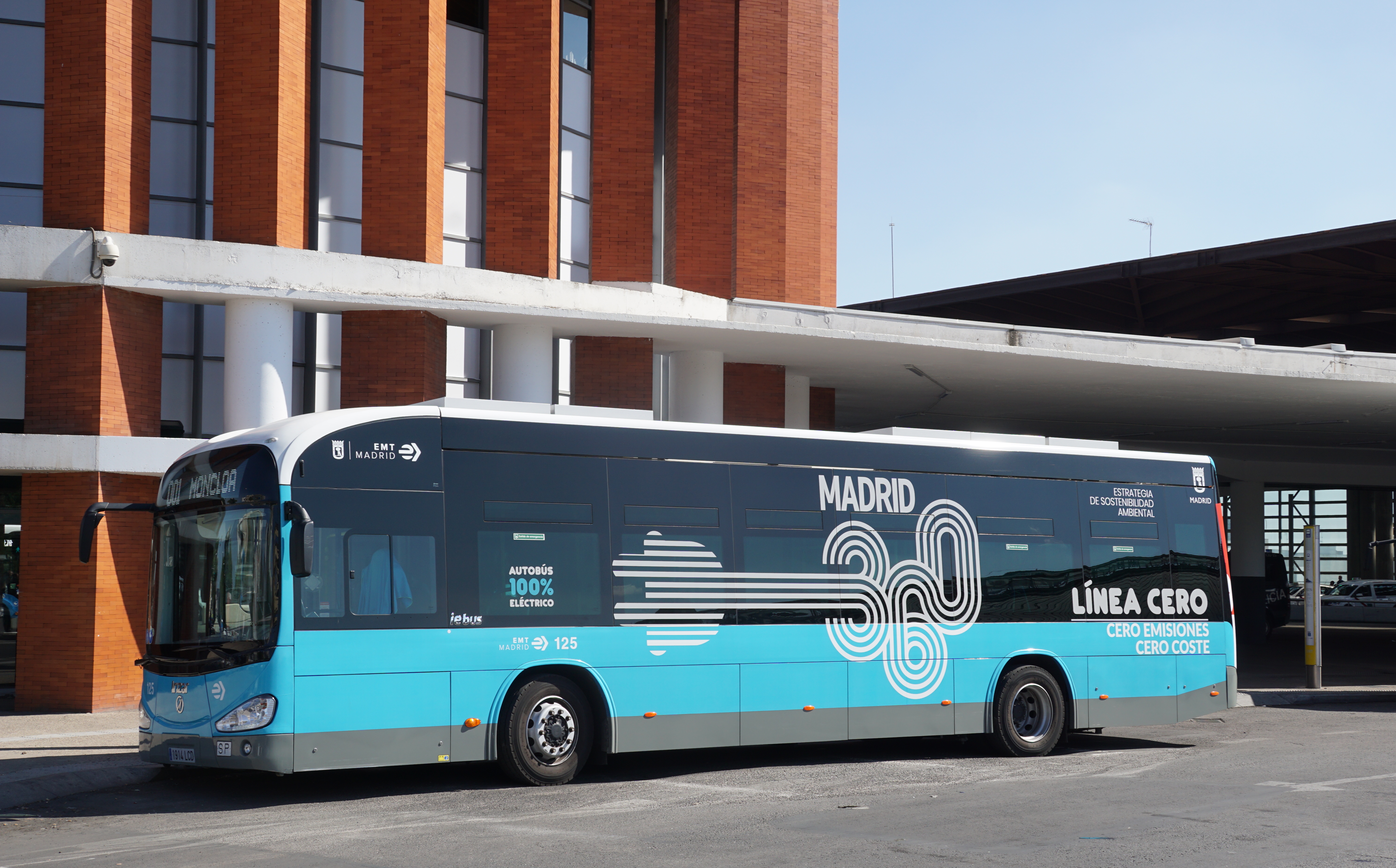 001 EMT Madrid en la estación de Atocha, agosto 2020